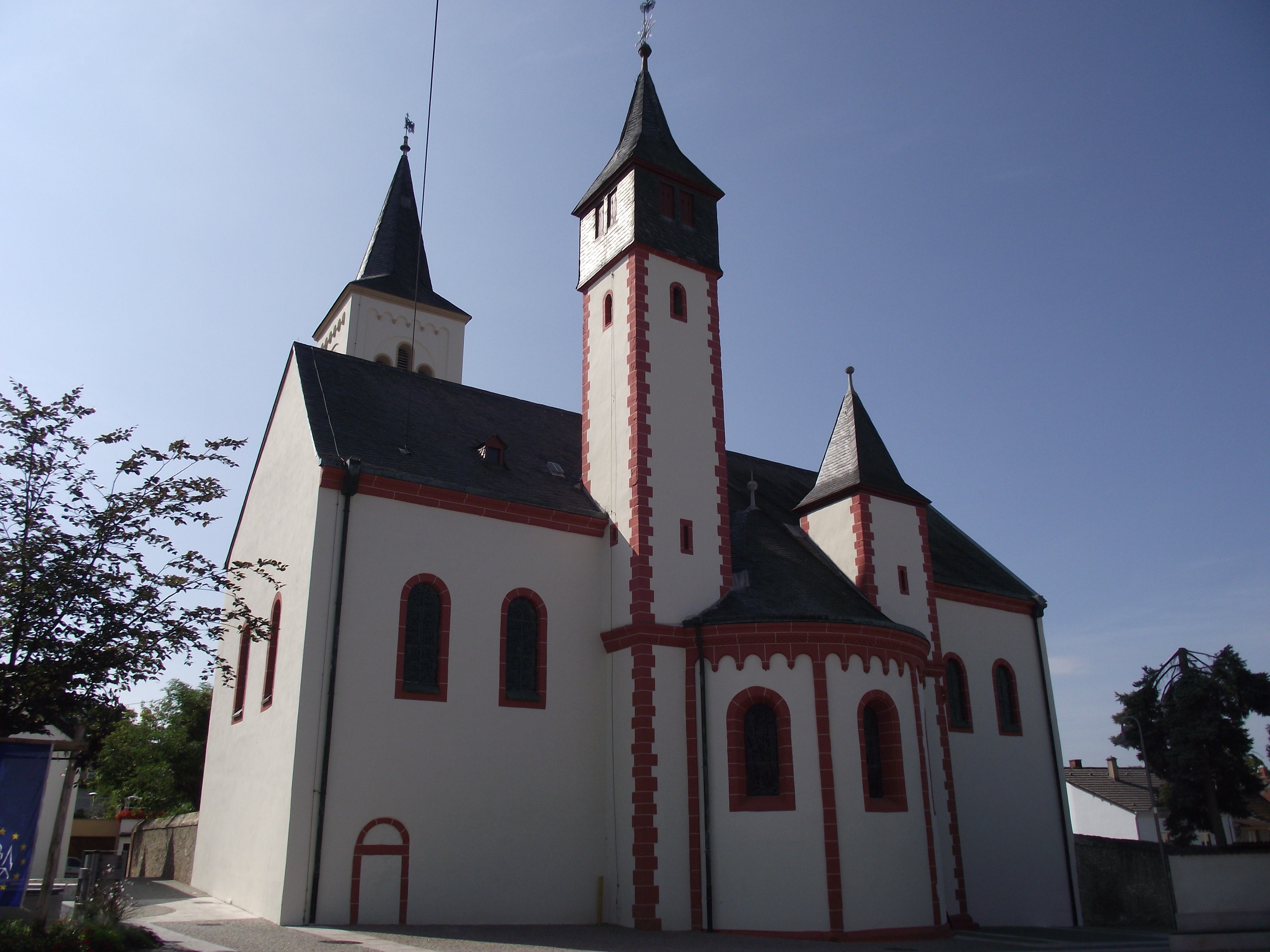 Saalkirche in Nieder-Ingelheim vom Osten gesehen